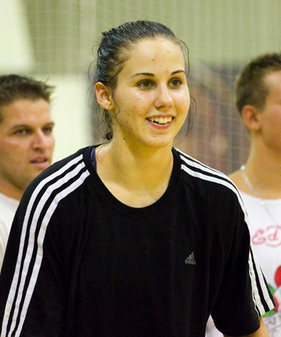 Fruzsina Palkó